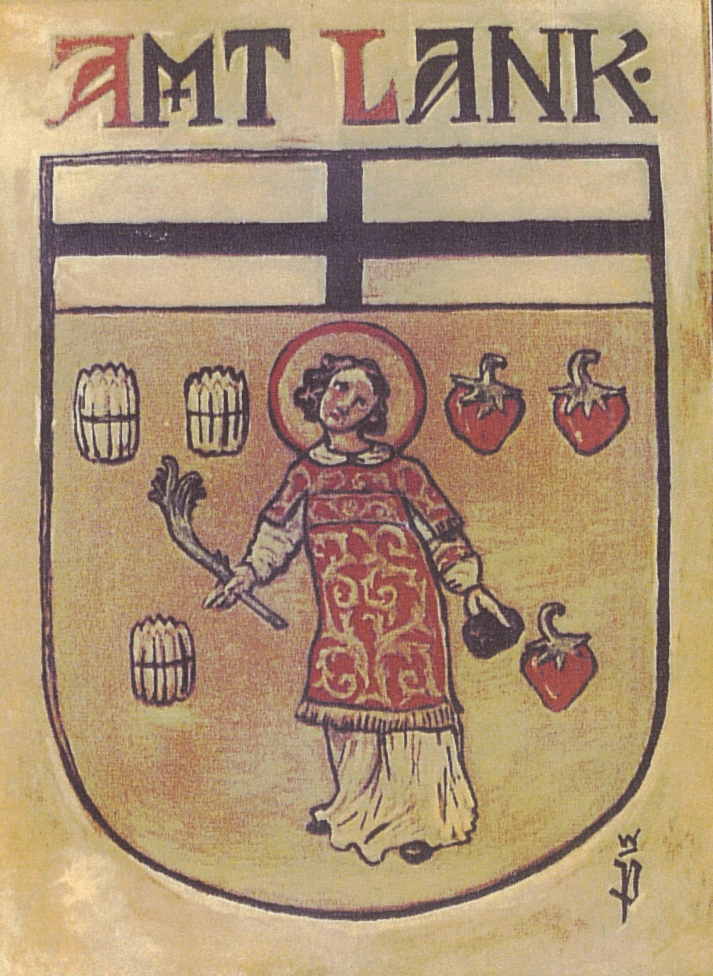 Historisches Wappen des Amtes Lank, geführt von 1952 bis 1970